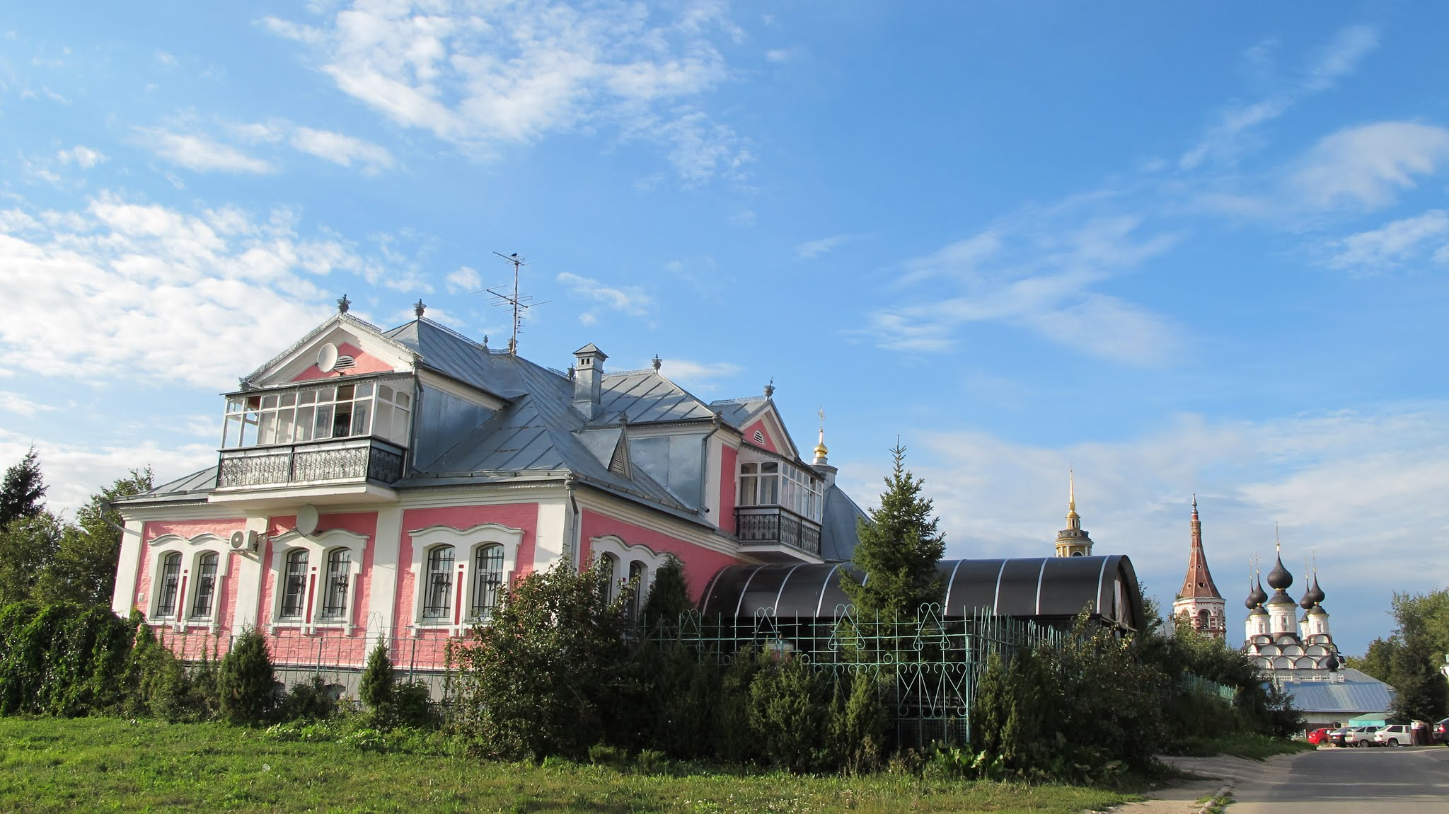 Suzdal, Vladimir Oblast, Russia